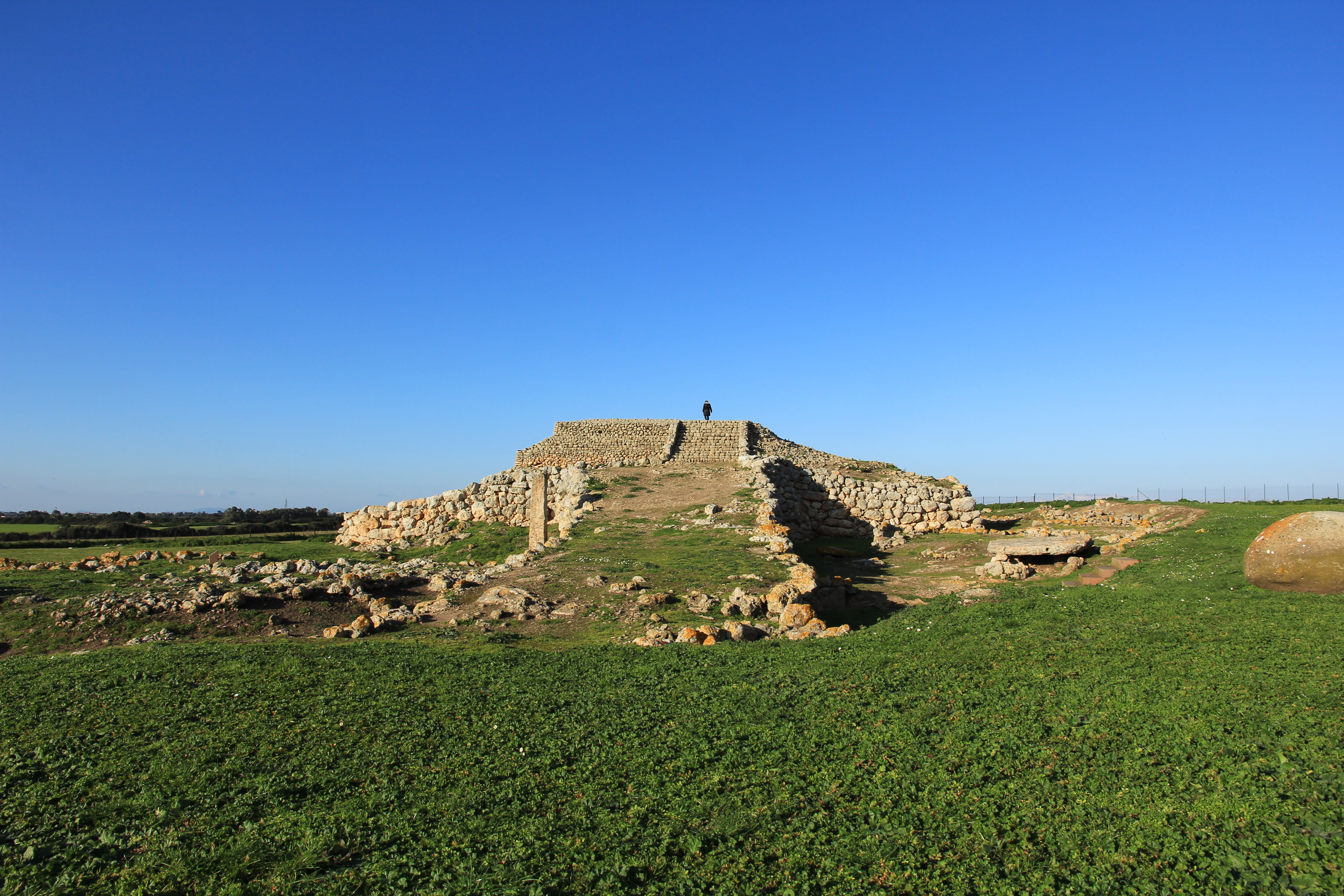 Sassari - Complesso prenuragico di Monte d'Accoddi